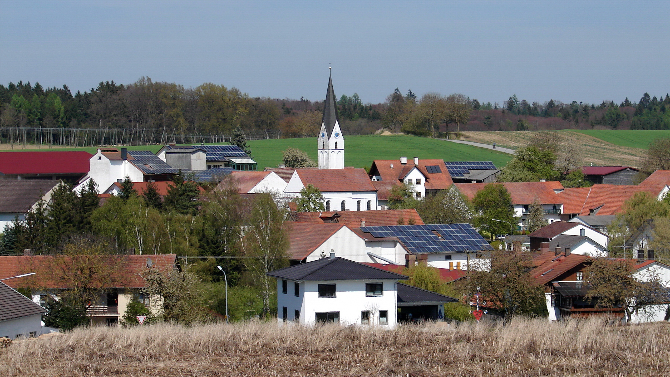 Oberhornbach ist ein Ortsteil der Marktgemeinde Pfeffenhausen im niederbayerischen Landkreis Landshut.